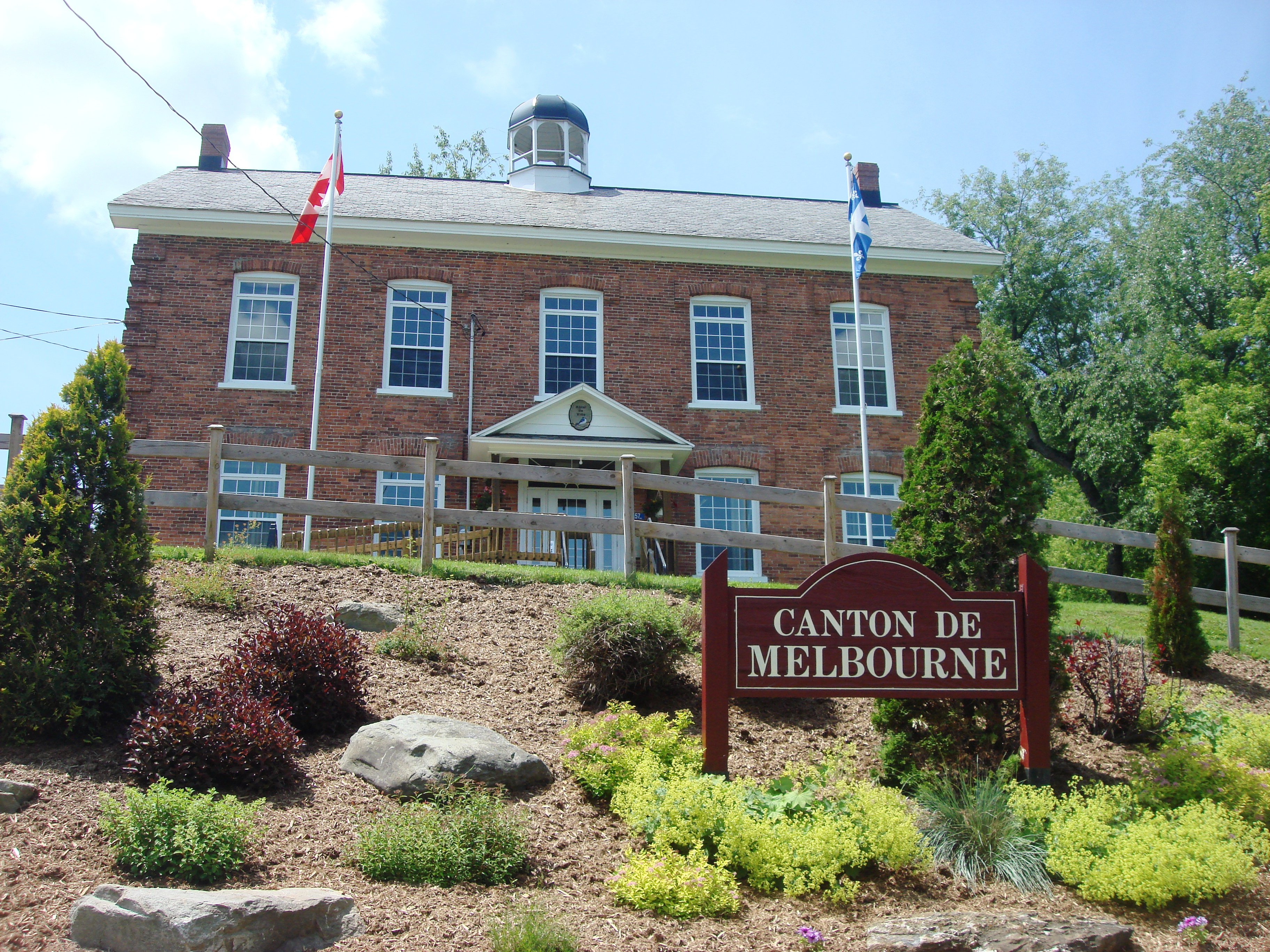 Hotel de ville du canton de Melbourne.